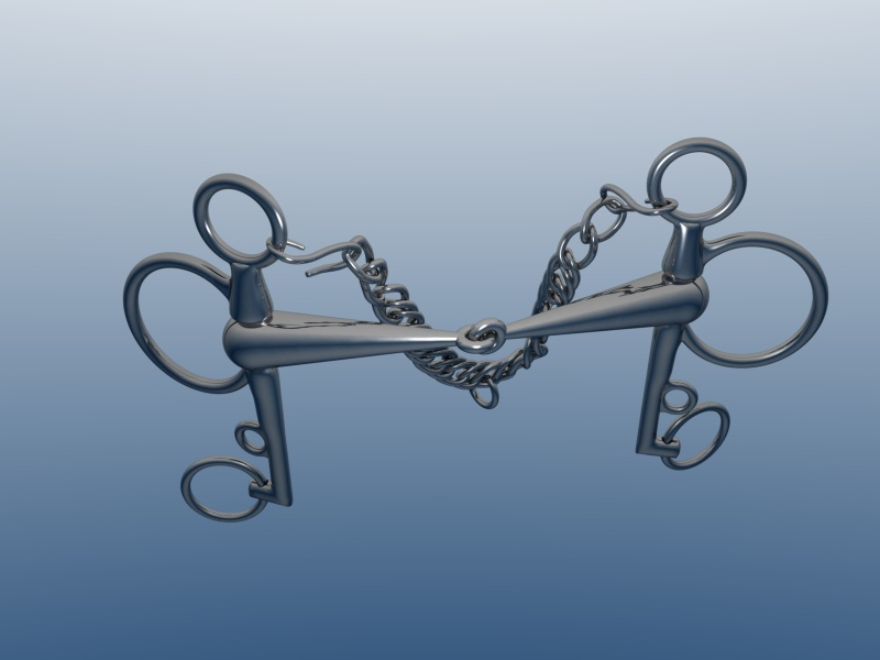 a pelham bit with port mouthpiece and curb chain. Un pelham à canons brisés. Les branches disposent d'un degré de liberté en rotation par rapport aux canons. Les anneaux supérieurs sont fixés aux montants du bridon. Les anneaux intermédiaires et les anneaux inférieurs sont reliés aux rênes, éventuellement par l'intermédiaire d'une alliance. La gourmette a des anneaux doublés au milieu, au point de contact, pour augmenter le confort du cheval lors de l'action avec la gourmette. Modélisé sous Blender par LardonCru.